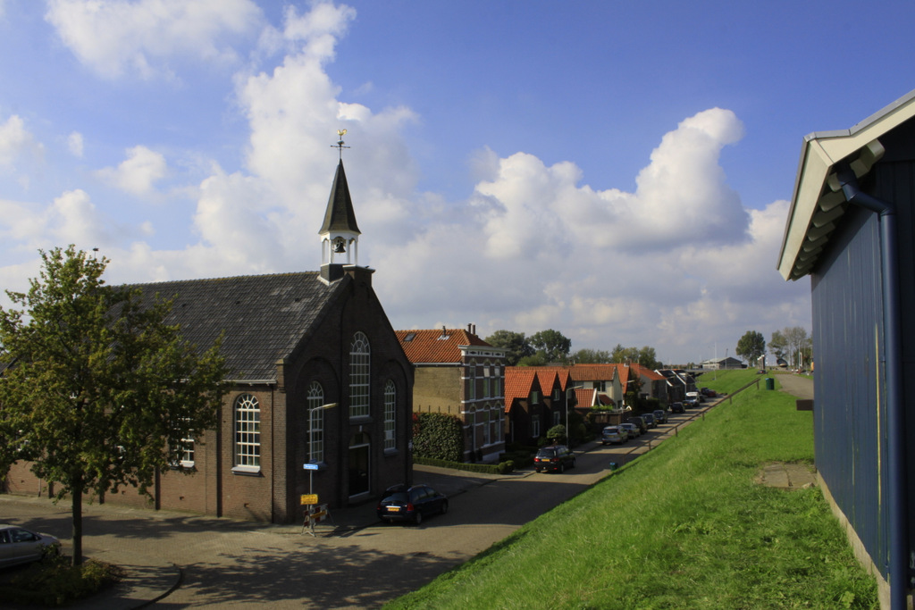 Op de Noorddijk aan de Haven van Bruinisse.op Schouwen-Duiveland.